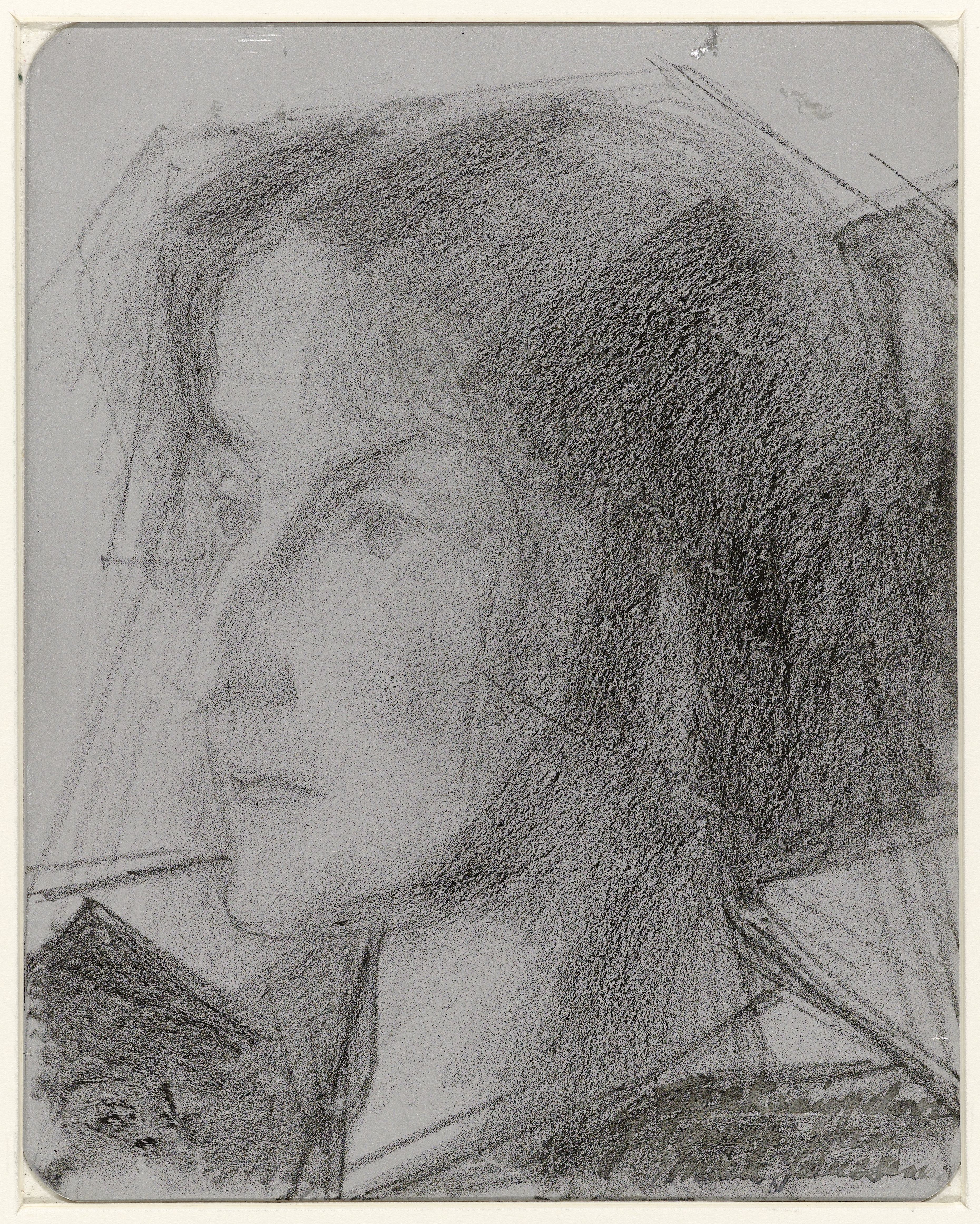 IdentificatieTitel(s): Portret van Miek JanssenObjecttype: tekening ontwerp Objectnummer: RP-T-00-2481Omschrijving: Ontwerp voor een prent.VervaardigingVervaardiger: tekenaar: Jan TooropDatering: 1868 - 1928Fysieke kenmerken: zwart krijtMateriaal: metaal zink krijt Afmetingen: h 149 mm × b 114 mmOnderwerpWie: Miek JanssenVerwerving en rechtenVerwerving: aankoop 1972Copyright: Publiek domein